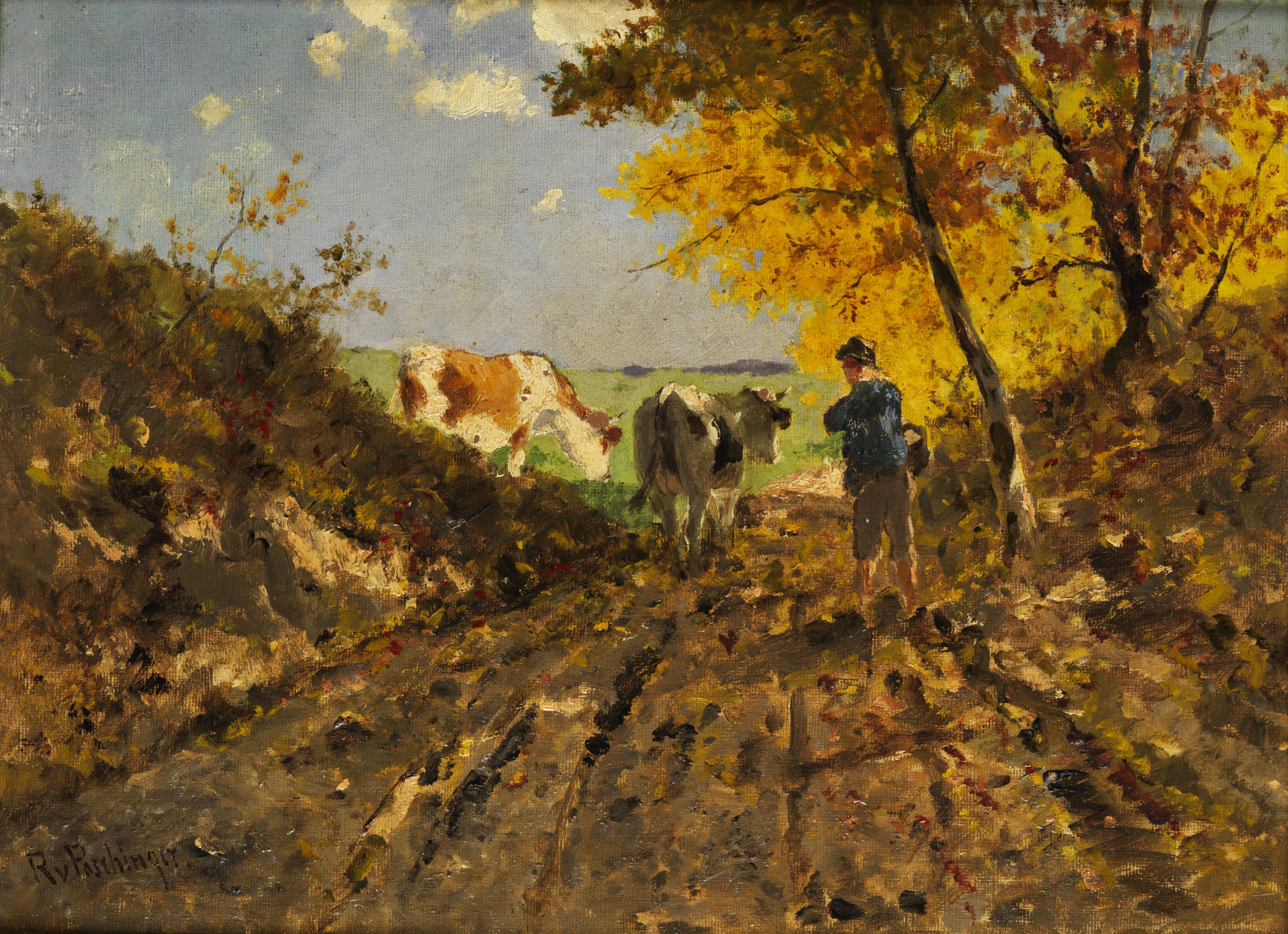 Herbstlandschaft mit Kühen. Öl auf Holz. 39 x 29 cm.